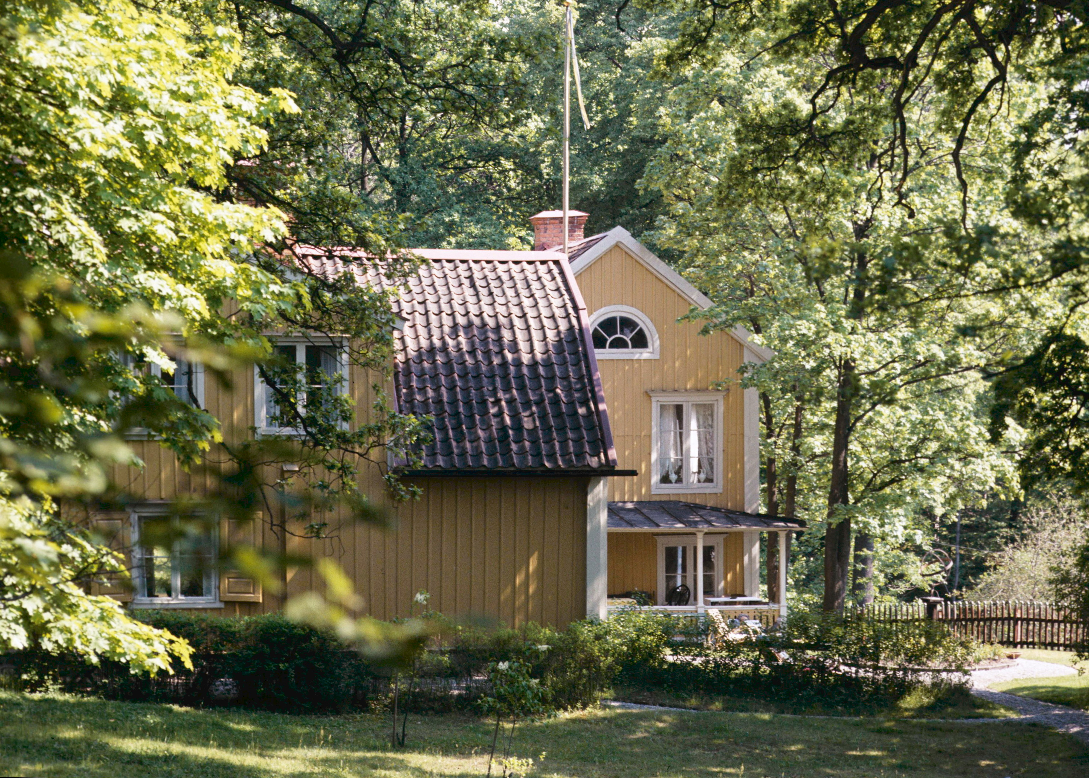 Lidingsbergs gård på södra Lidingö. Bilden troligen från början av 1970-talet. Motiv: Lidingö Nyckelord: Byggnadsminnen Kategori: Villastad/villasamhälle, Bostadshus Lidingsbergs gård på södra Lidingö. Bilden troligen från början av 1970-talet.